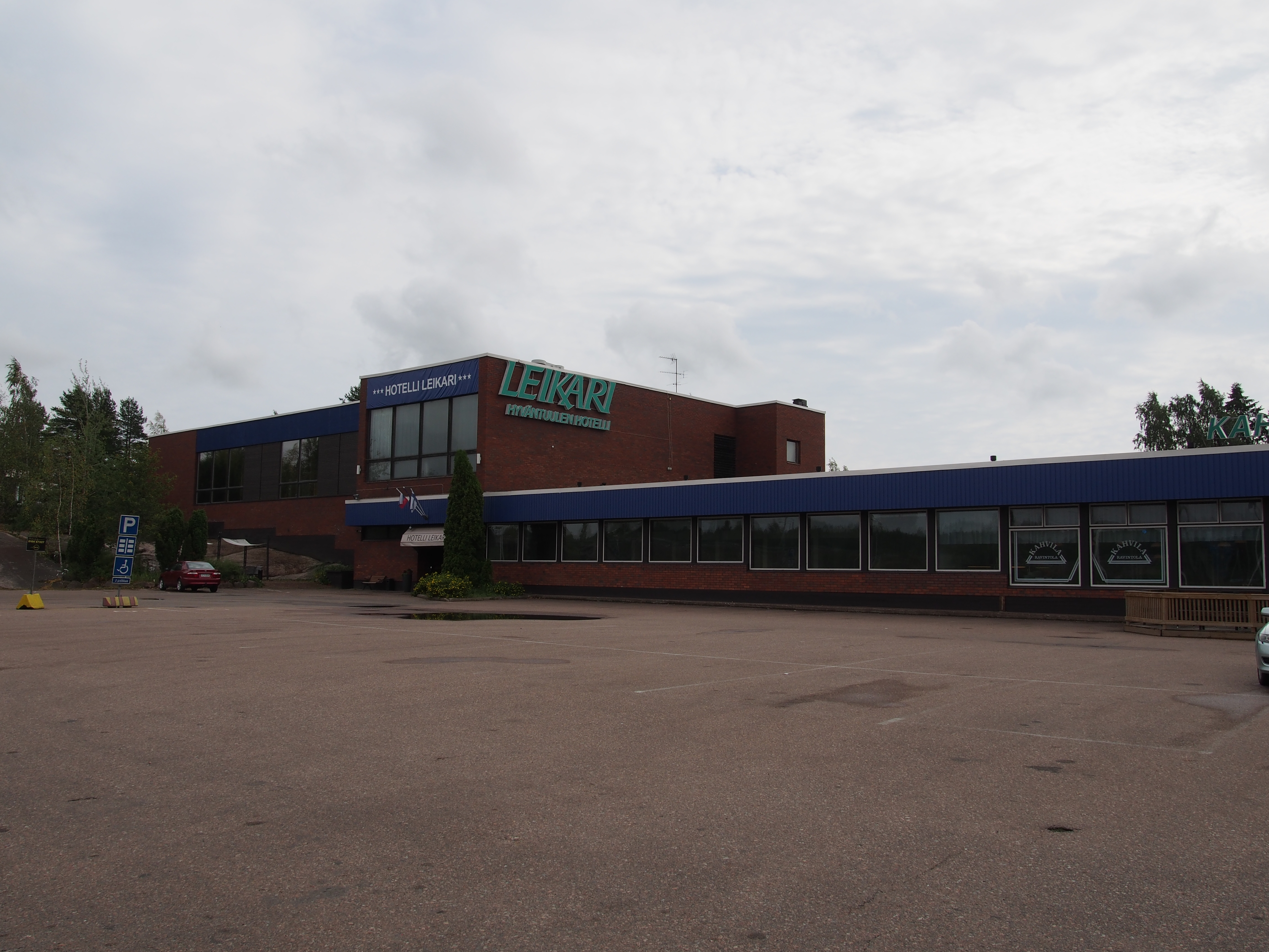 Hotelli Leikari Kotkassa.